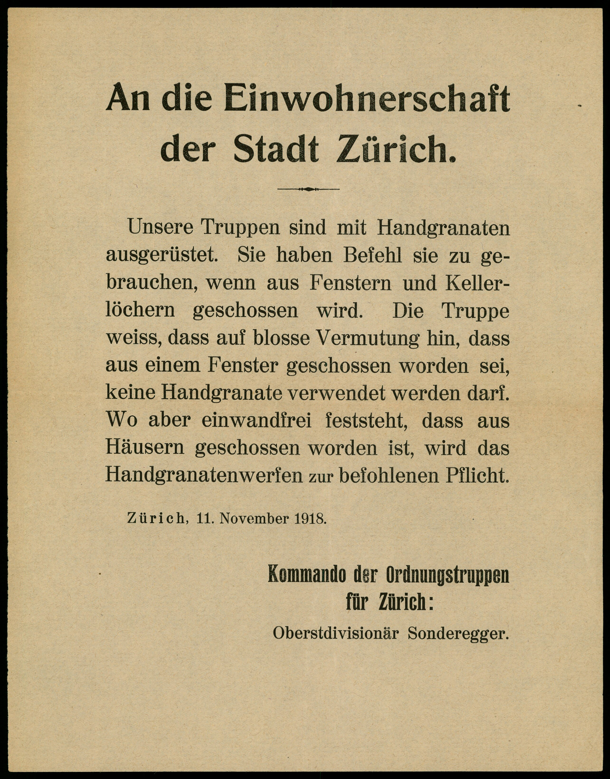 Anschlag des Kommandanten der Ordnungstruppen in Zürich anlässlich des Landesstreiks von 1918